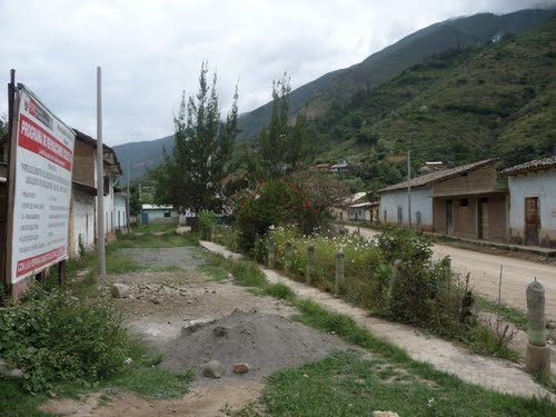 Esta imagen es la comunidad de cochachinche.